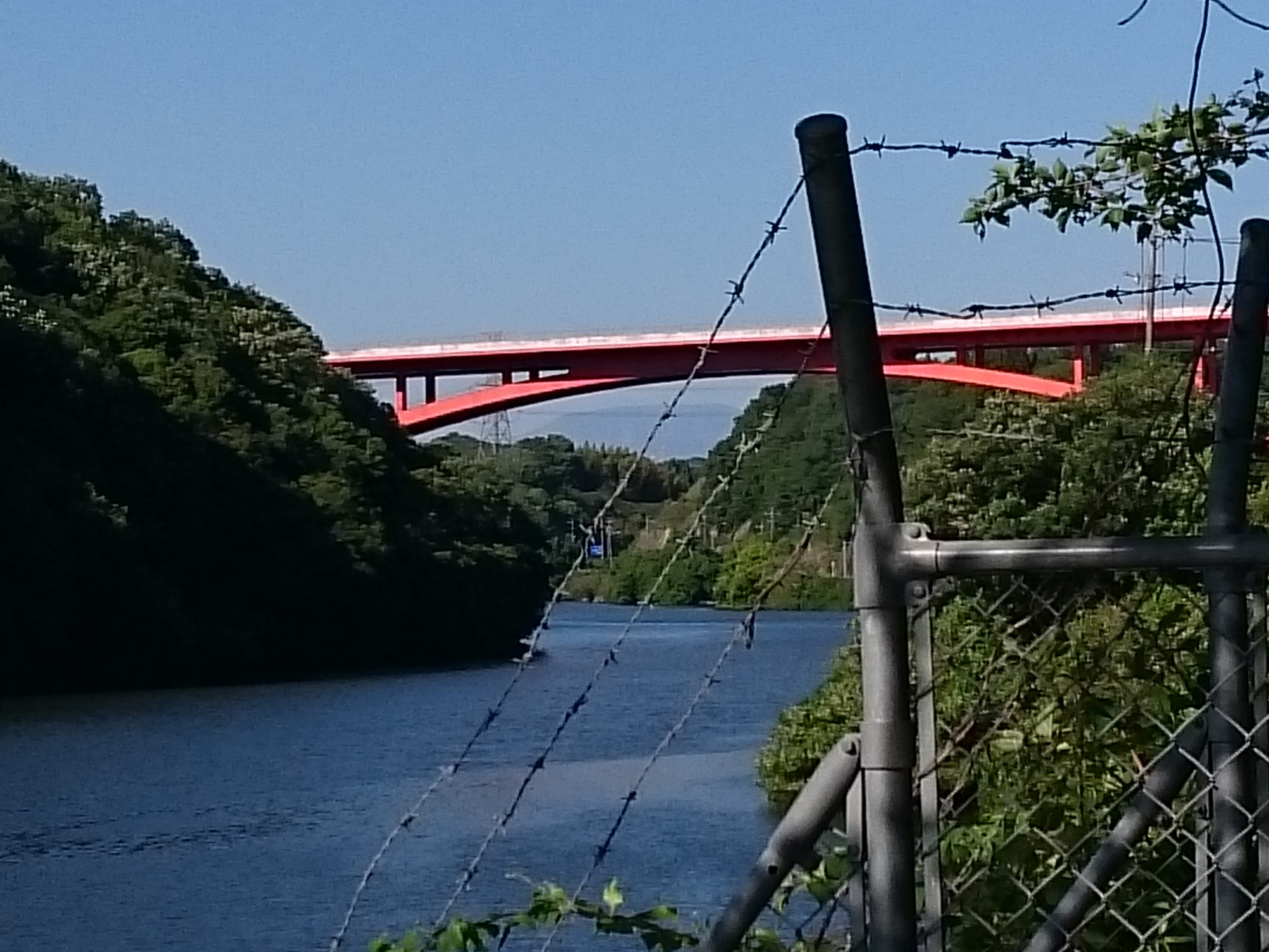 国道153号の駐車スペース（勘八峡）より撮影した恵那山。東海環状自動車道の橋脚の下に見える。